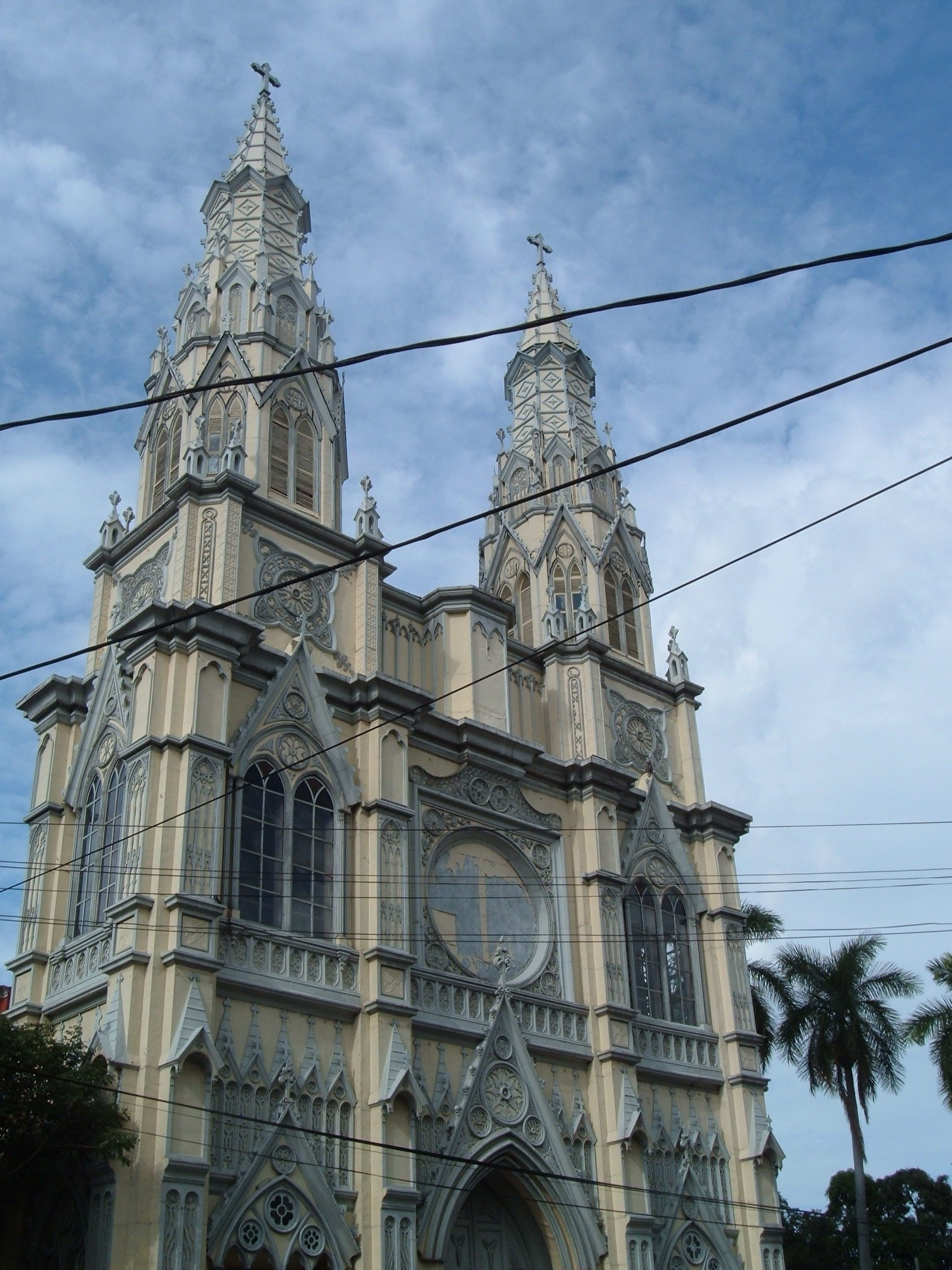 "Basílica del Sagrado Corazón de Jesús" in San Salvador, El Salvador.